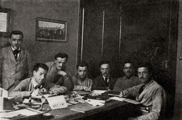 Occupation ouvrière des usines FIAT, Turin 1920